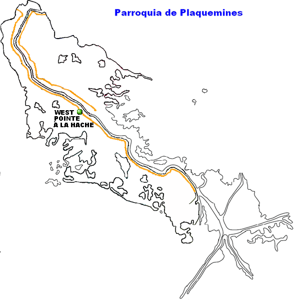 West Pointe à la Hache, Louisiana